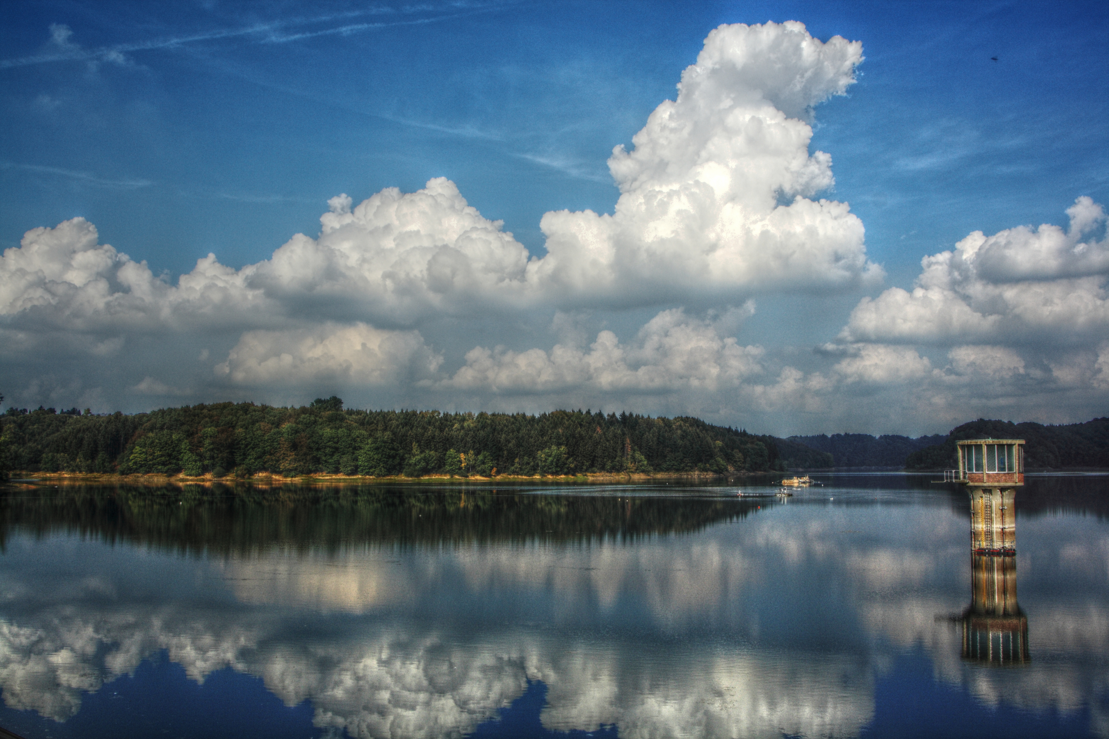 Die Wahnbachtalsperre. Blick vom Damm nach Pinn